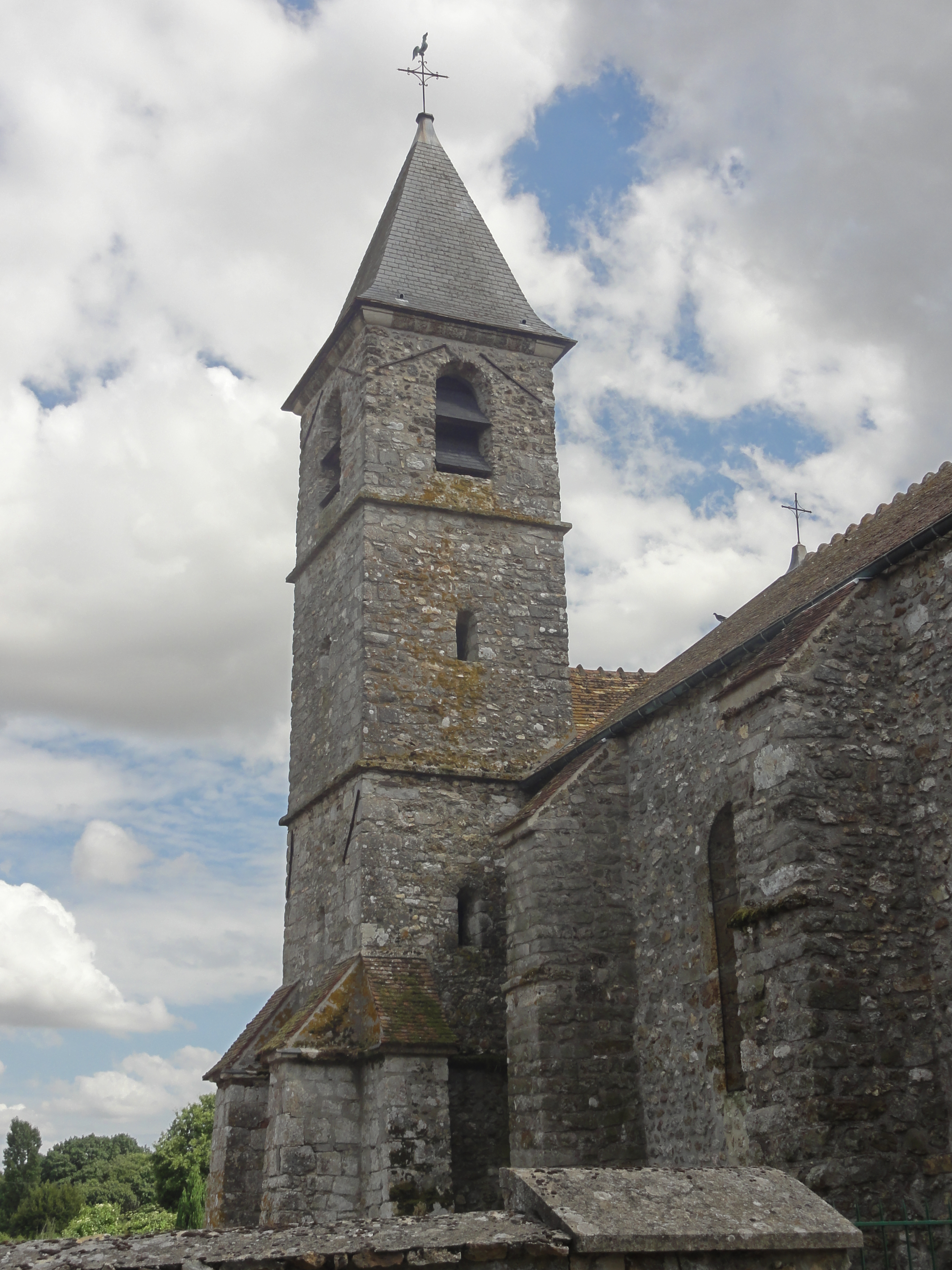 Clocher.